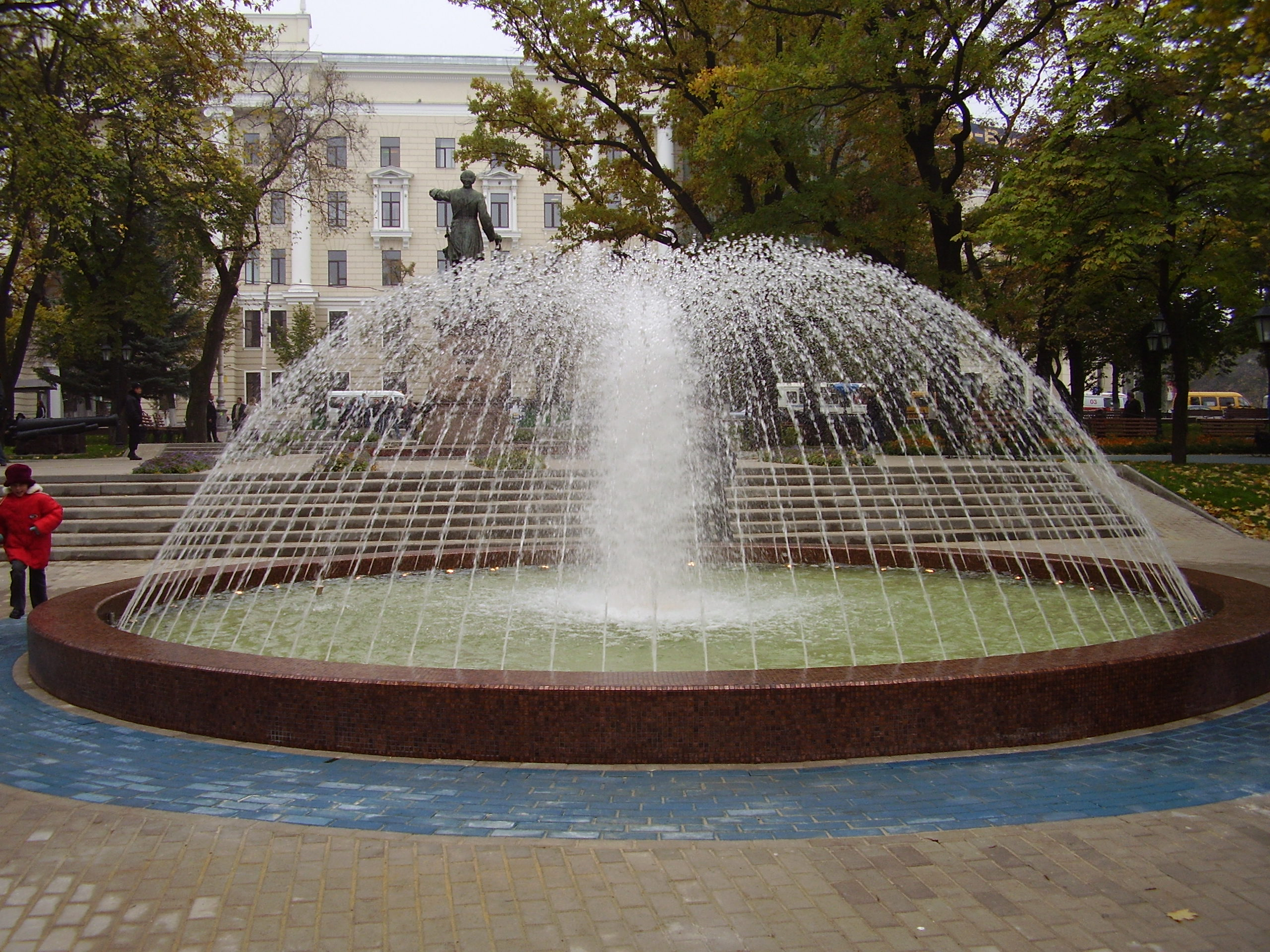 Воронеж,фонтан у памятника Петру_1